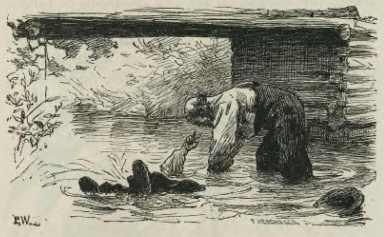 Sagobok för barn